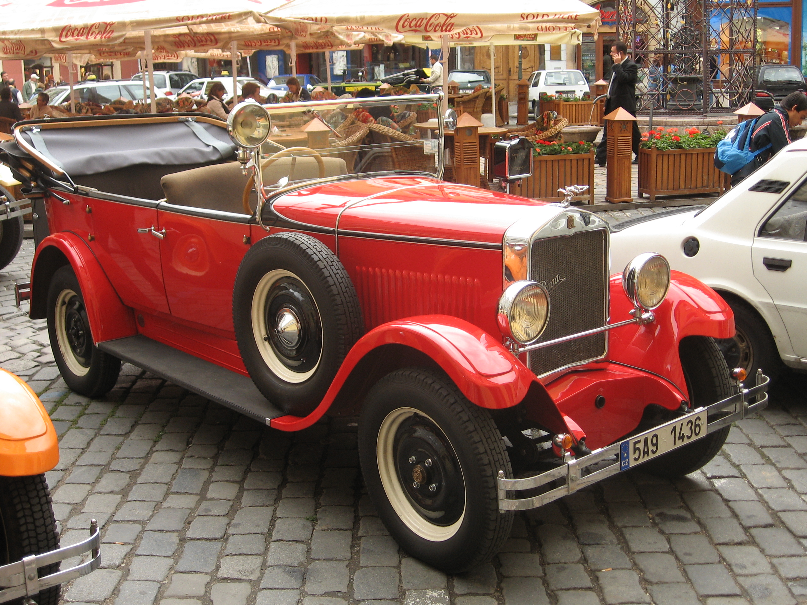 Praga Alfa